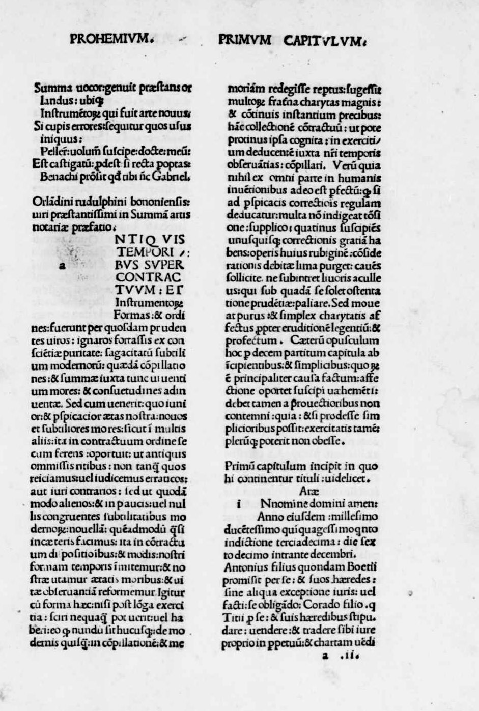 Carta a2r